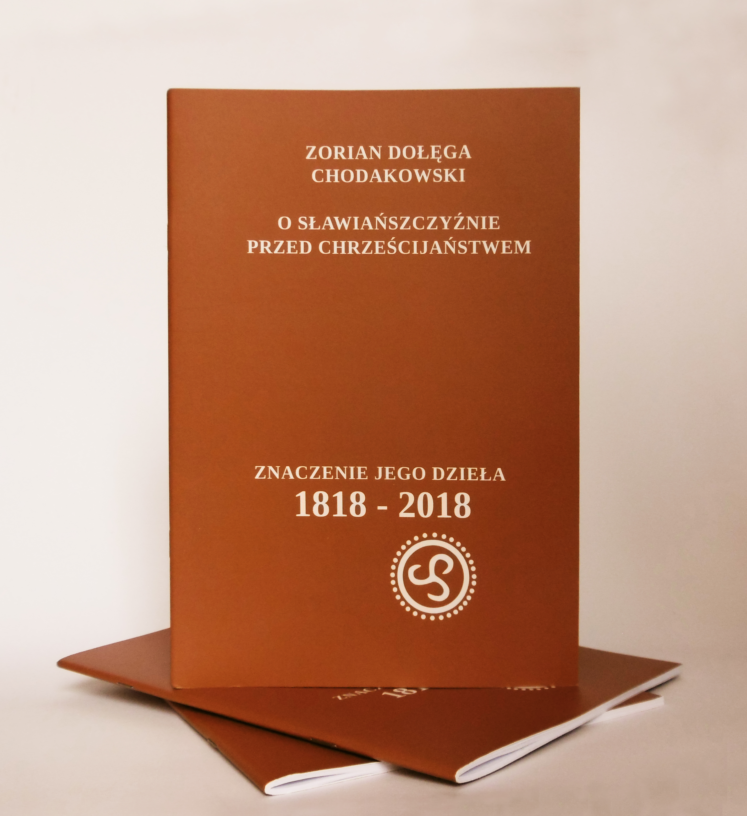 Zorian Dołęga-Chodakowski „O Sławiańszczyźnie przed chrześcijaństwem”